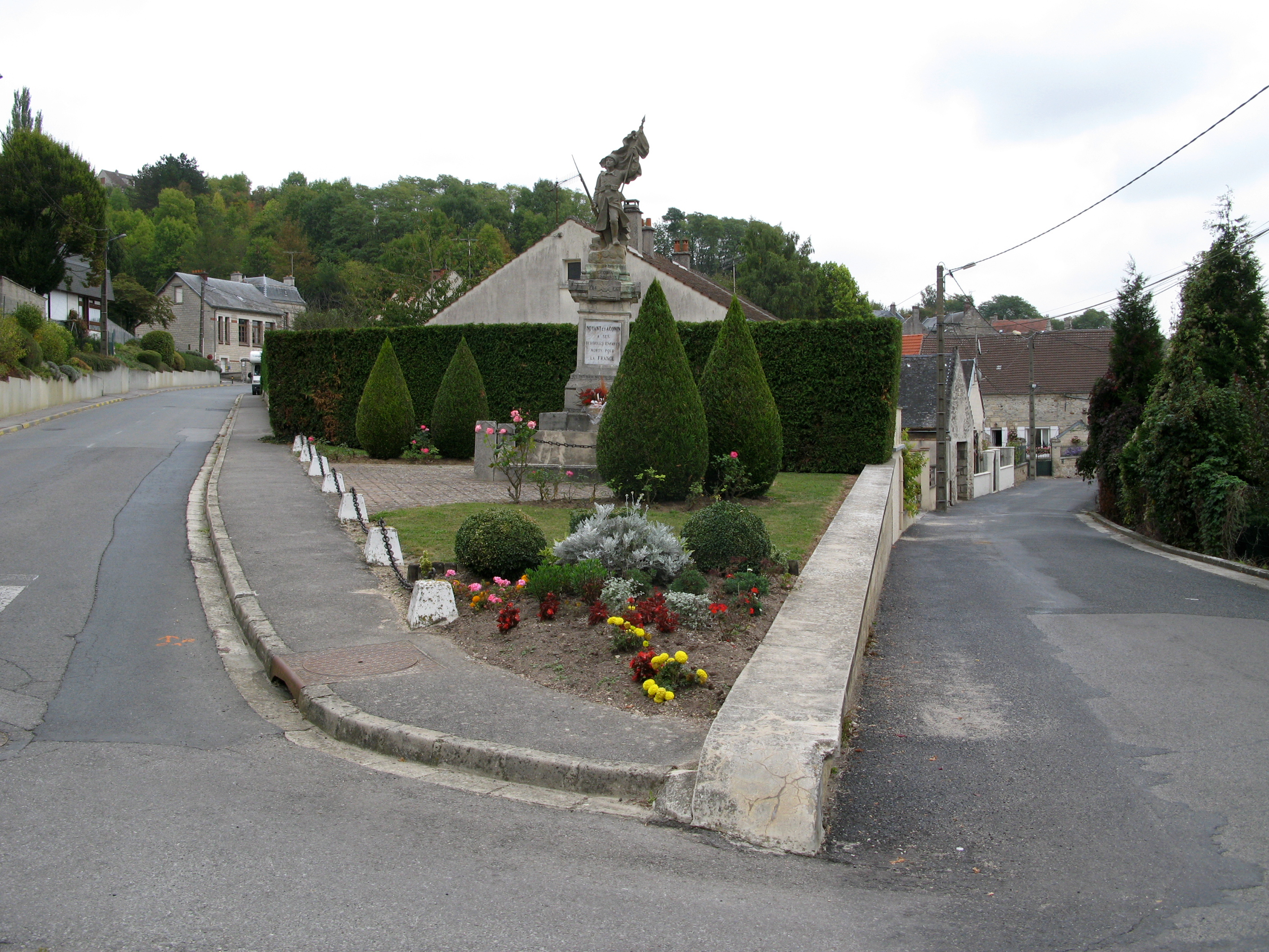 Noyant-et-Aconin (Aisne, France) - Le monument-aux-morts. . .